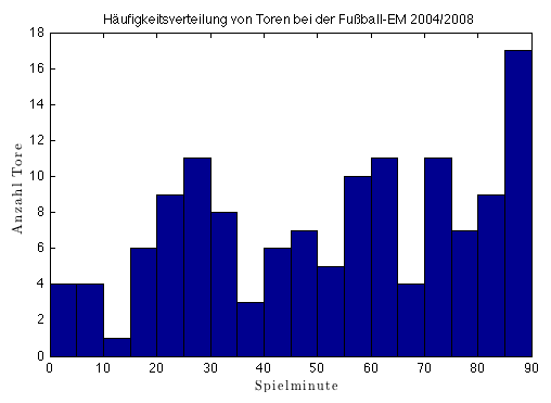 Häufigkeitsverteilung von Toren bei der Fußball-EM 2004/2008